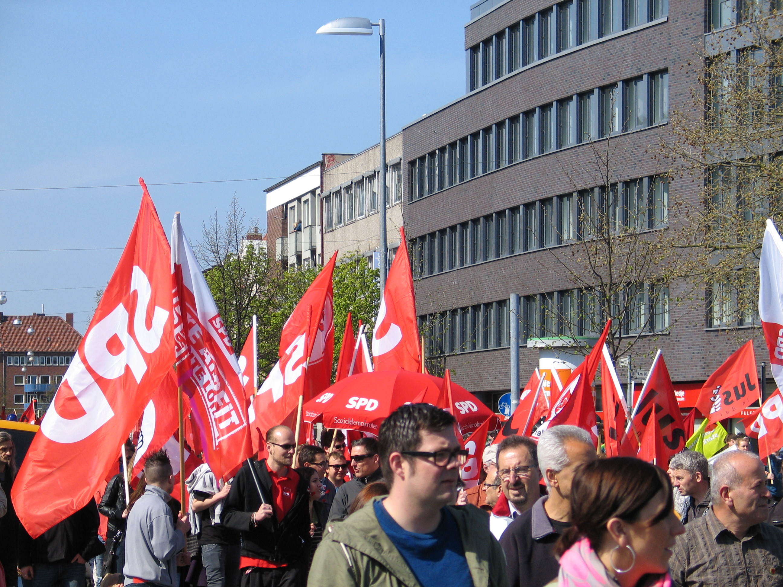 Unbearbeitetes, dafür zeitnah hochgeladenes Foto vom 1. Mai 2013 in Hannover: Der Deutsche Gewerkschaftsbund hatte zu den Demonstrationen unter dem Motto "Gute Arbeit. Sichere Rente. Soziales Europa" aufgerufen. Vielleicht letztmals zogen Demonstranten und unterschiedlichste Gruppierungen vom Freizeitheim Linden zum Klagesmarkt, den die Stadt Hannover im Zuge der Umbaumaßnahmen von Hannover City 2020 + demnächst mit Häusern bebauen will. Auch 2013 nahmen insbesondere Familien mit Kindern an den Feierlichkeiten teil und konnten vielleicht letztmals gleichzeitig in der Grünfläche des Gartendenkmals Alter St. Nikolai Friedhof Erholung finden ...